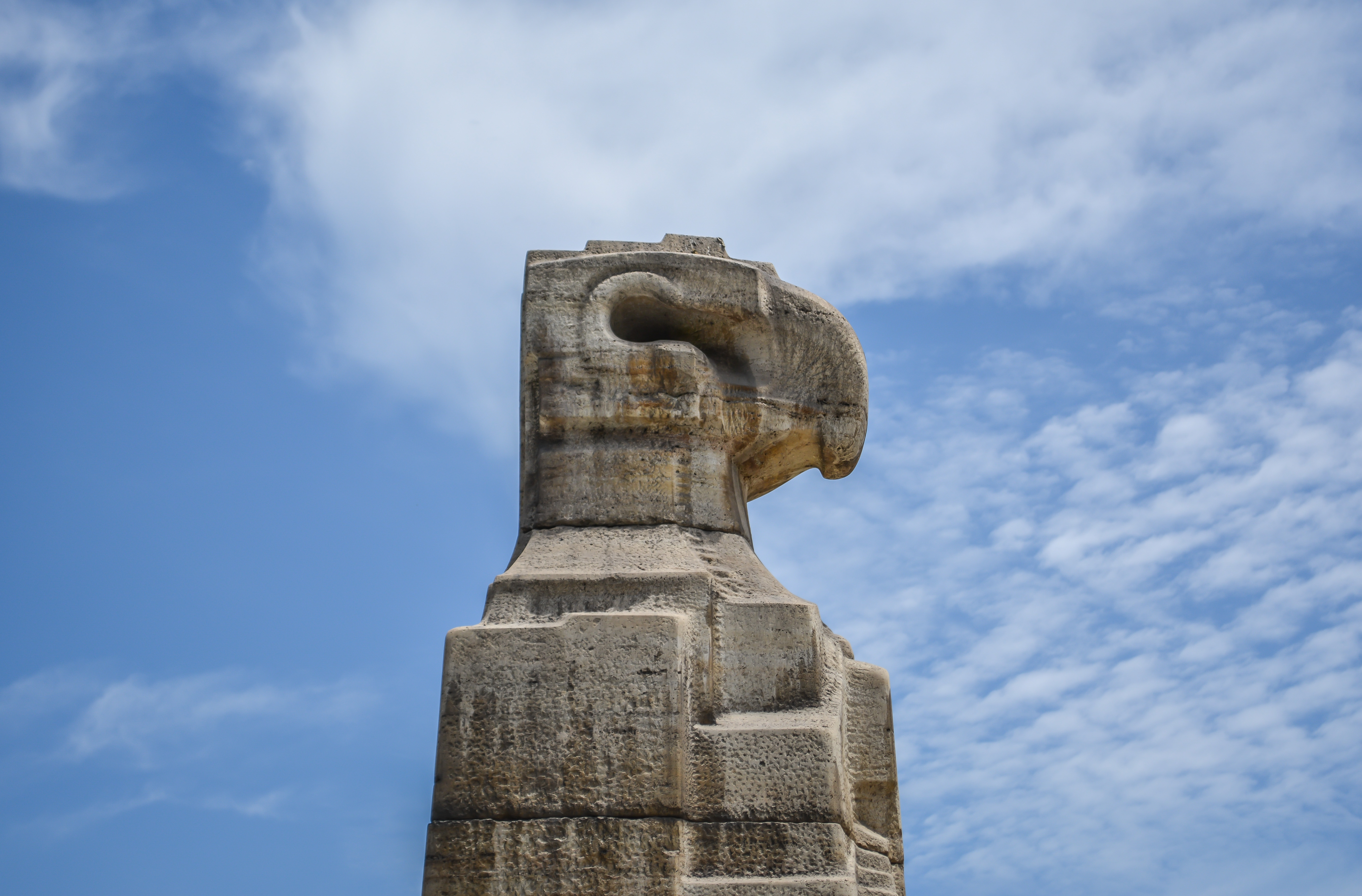 Monumento a Alfredo Salazar Southwell, Miraflores, Lima, Perú